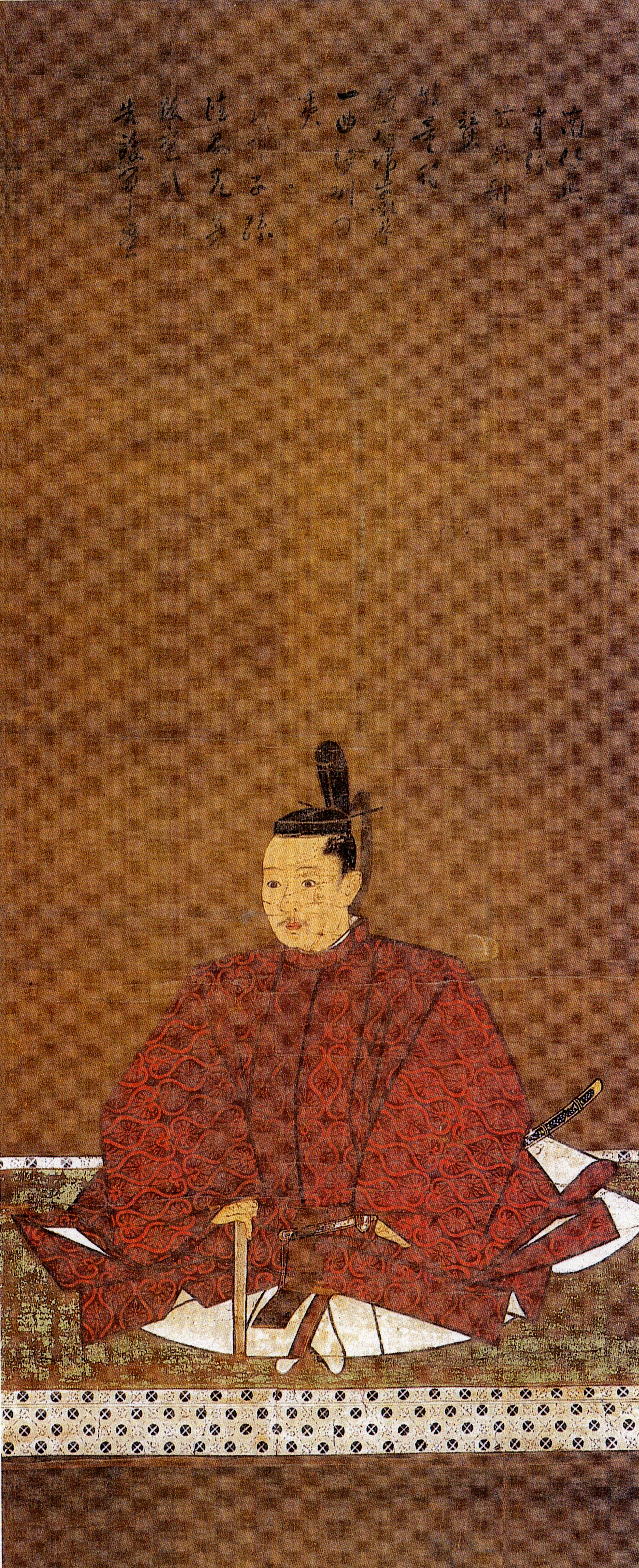 牧村利貞の肖像。